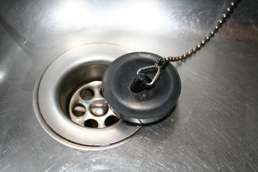 Gootsteenstop. Eigen werk